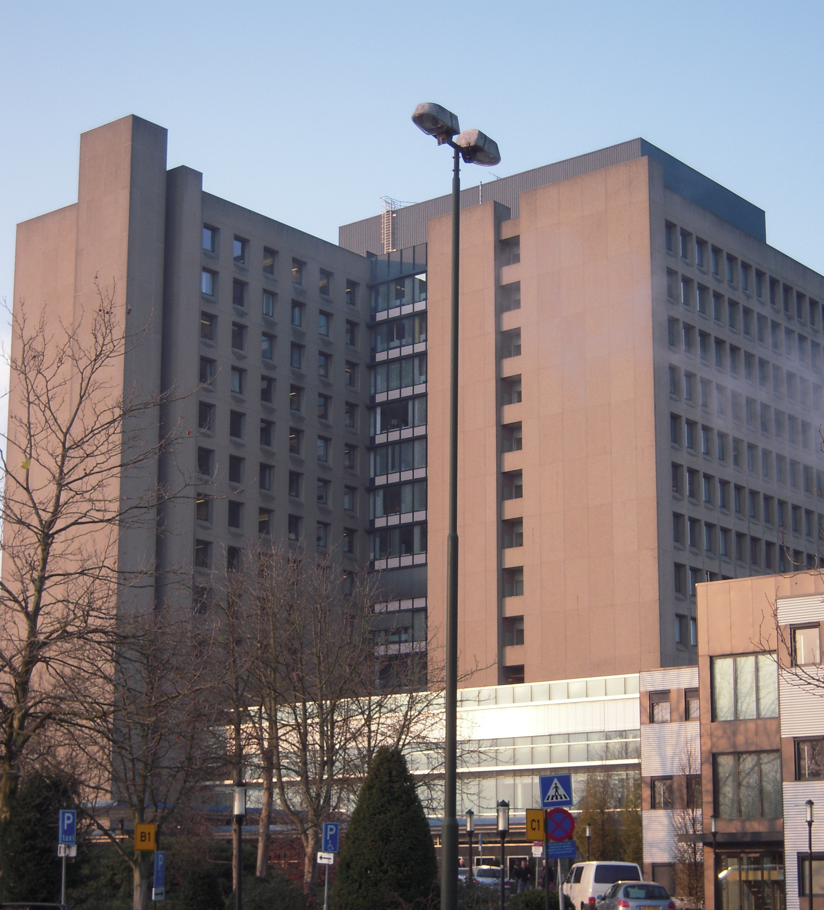 Catharina-ziekenhuis Eindhoven